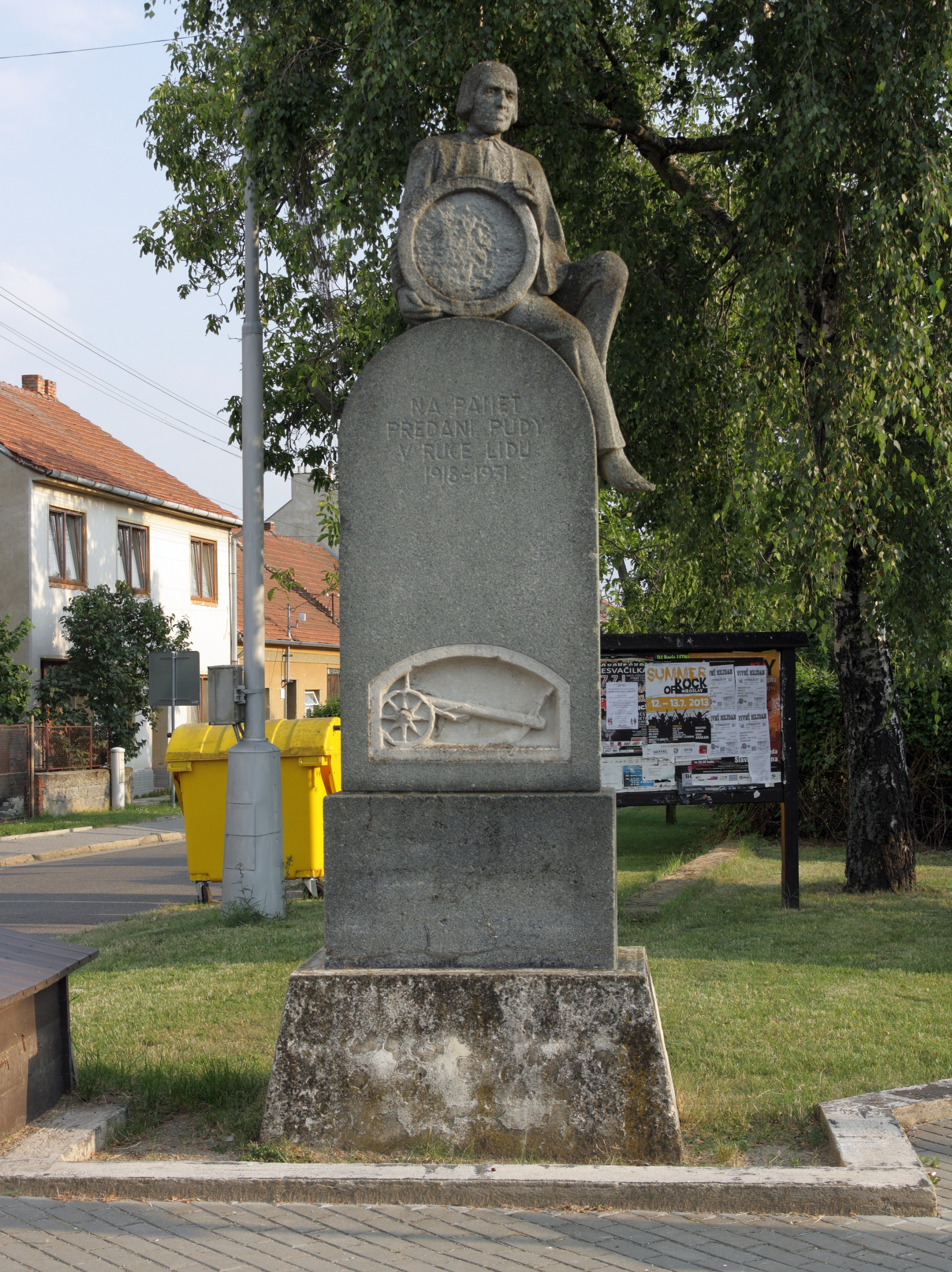 Měnín - památník pozemkové reformy 1918-1931.